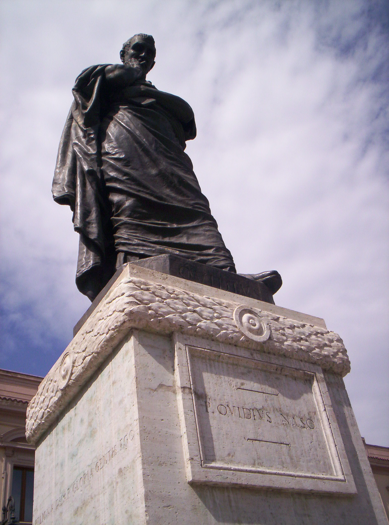 Foto scattata nell'estate del 2006 durante una mia visita a Sulmona; ritrae la statua dell'illustre cittadino Ovidio nato in questa stessa città. La lascio in pubblico dominio.